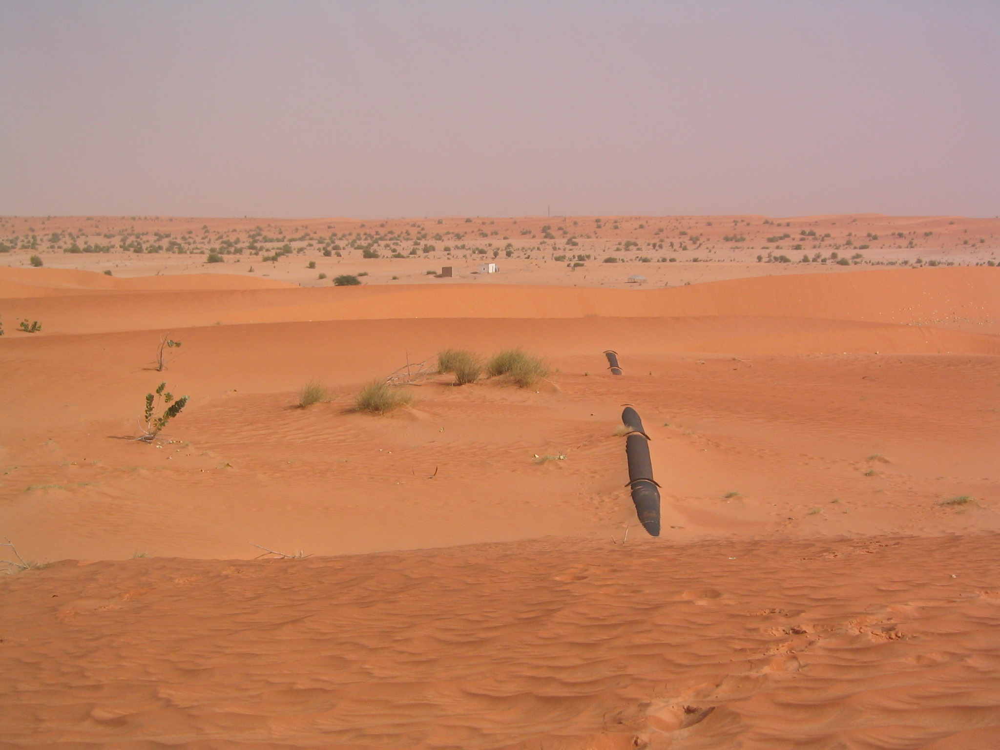 Conduite alimentant Nouakchott (Mauritanie) en eau douce depuis la nappe d'Idini située à une soixantaine de kilomètres.